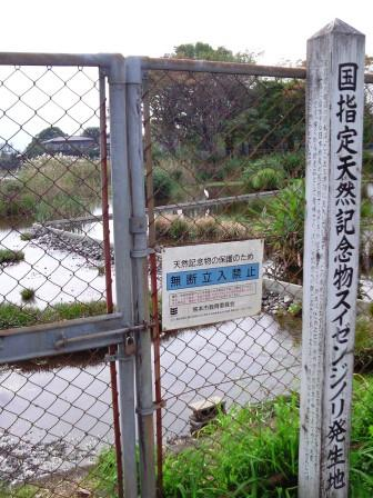 国指定天然記念物スイゼンジノリ発生地（熊本市中央区の上江津湖）